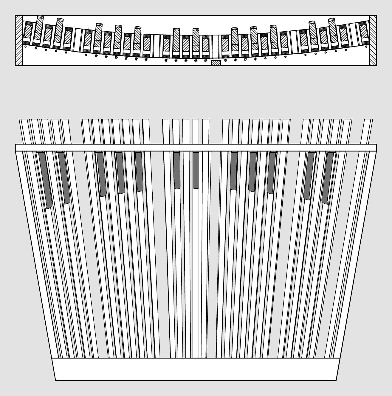 Schéma du pédalier BDO standard à marches radiales, vue de devant et vue de dessus. 30 marches.